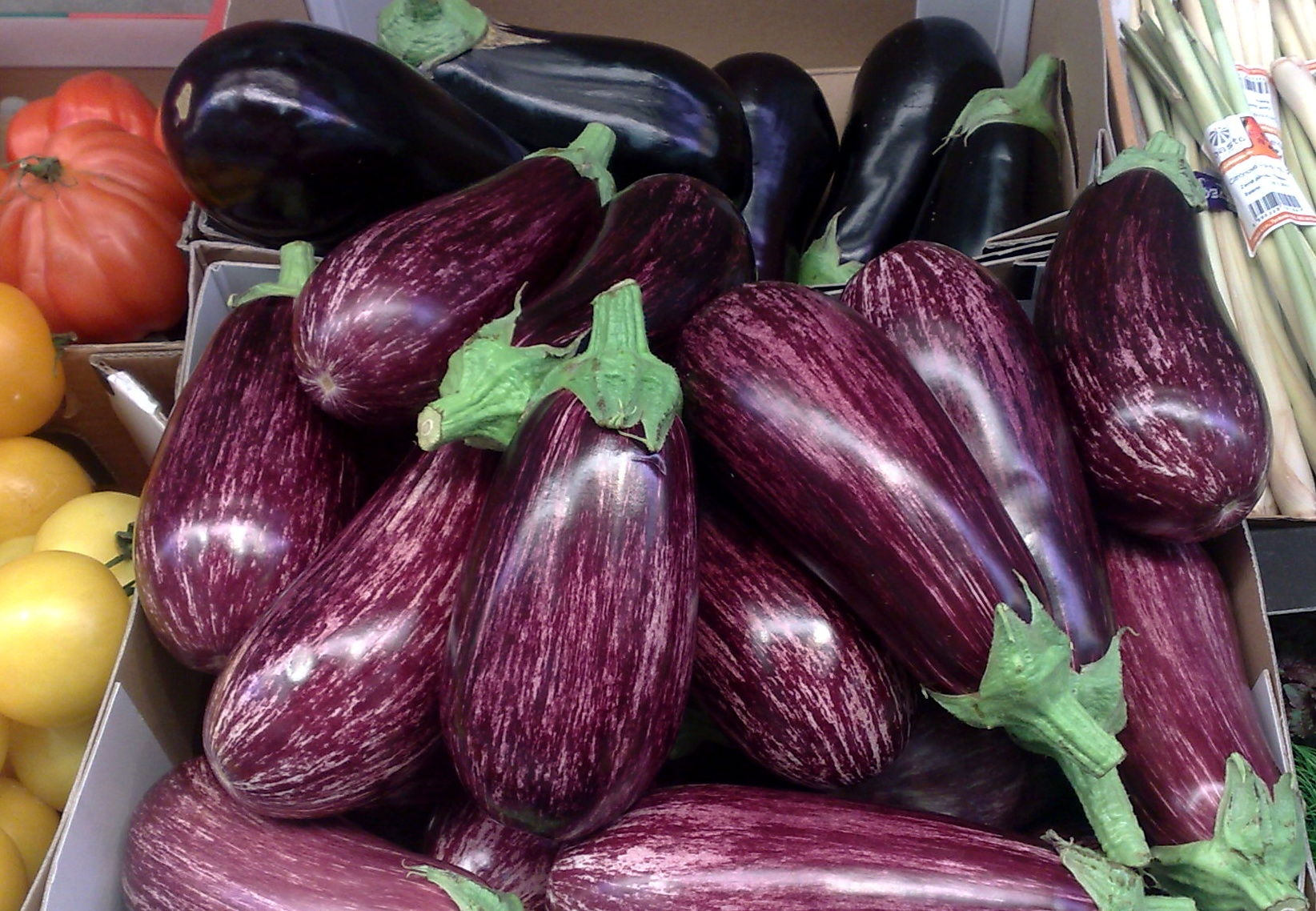 Baklažán